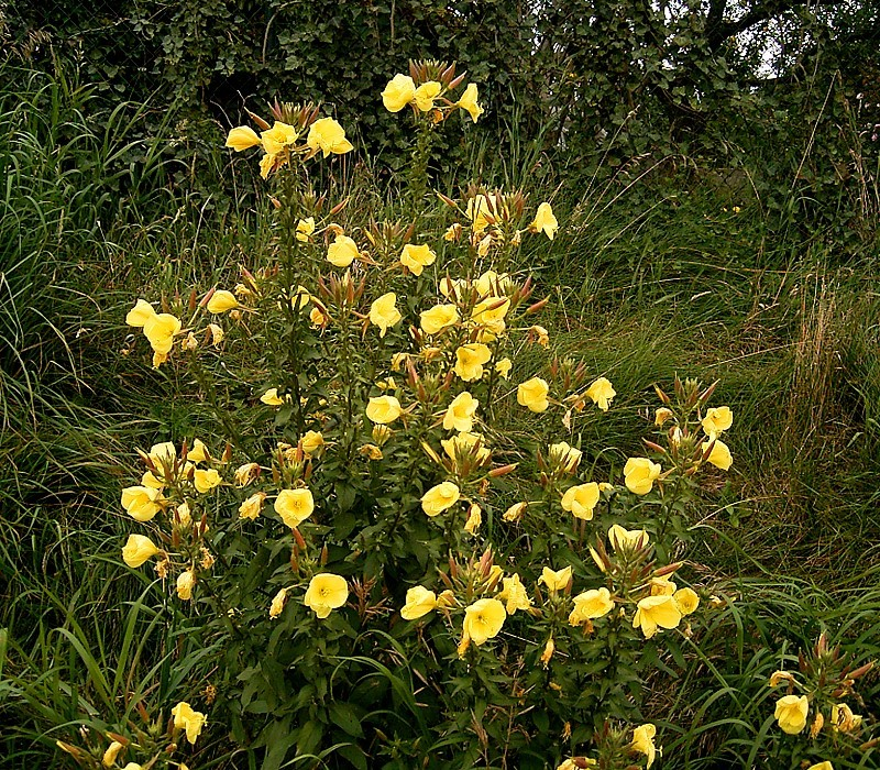 Oenothera glazioviana